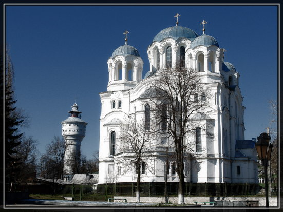 Трьох-Анастасіївська церква та водонапірна башта у місті Глухові Сумської області.